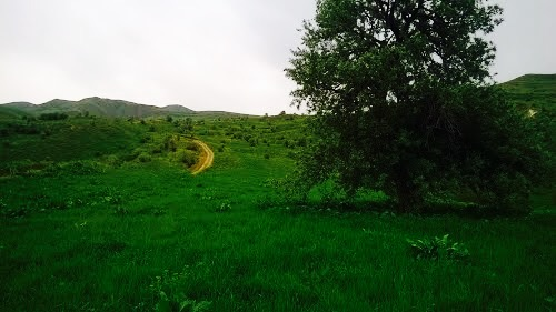 Teyvaz yaxınlığı